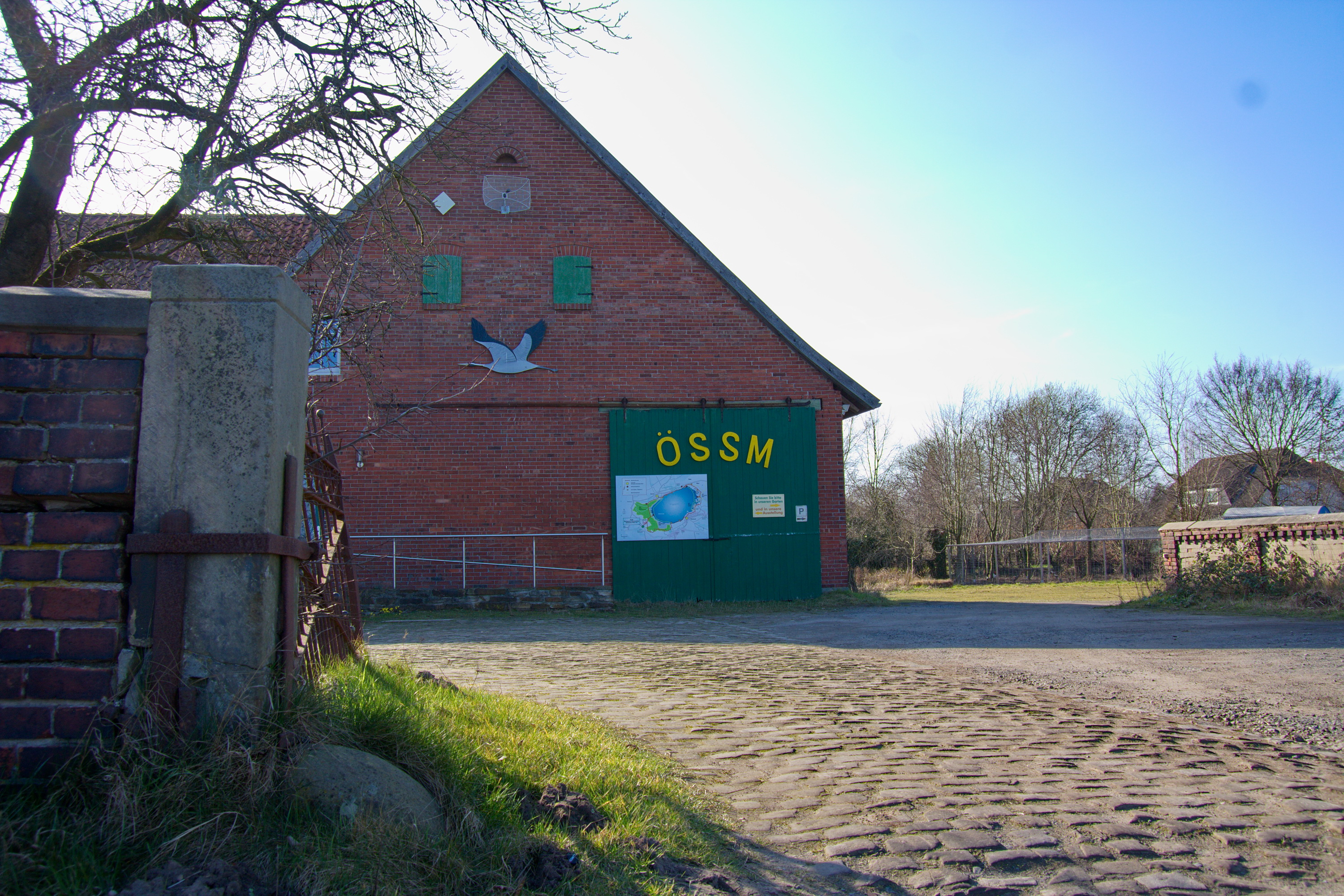 Ökologische Schutzstation Steinhuder Meer e.V. in Winzlar (Rehburg-Loccum), Niedersachsen, Deutschland